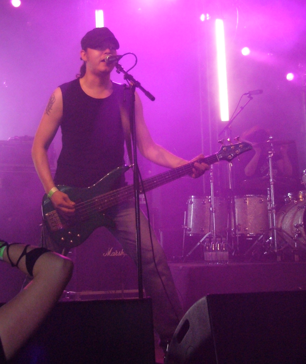 Finnische Dark-Metal-Band Before the Dawn beim Tuska Open Air 2008